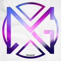 메스그램 로고